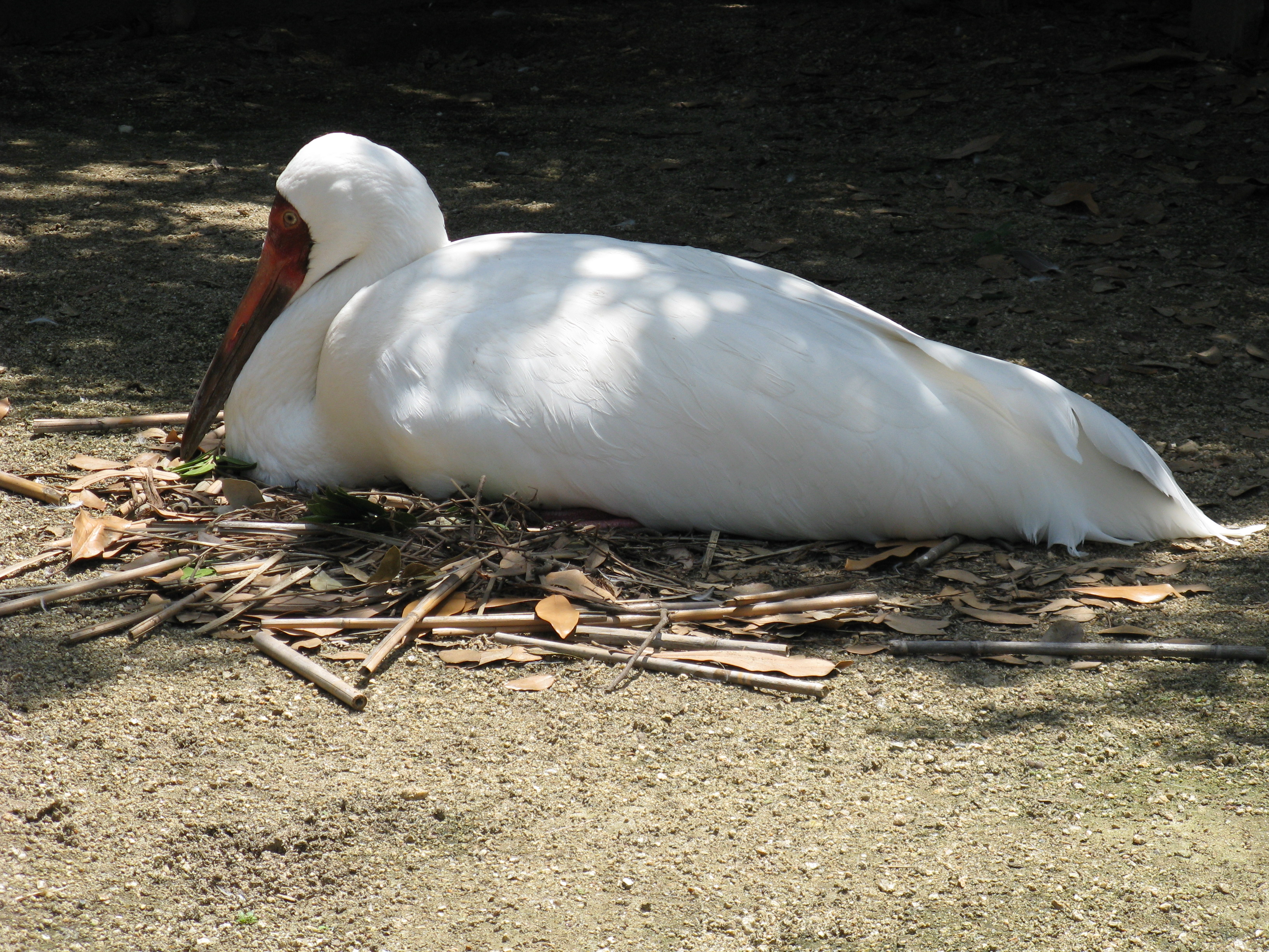 Scientific name Grus leucogeranus